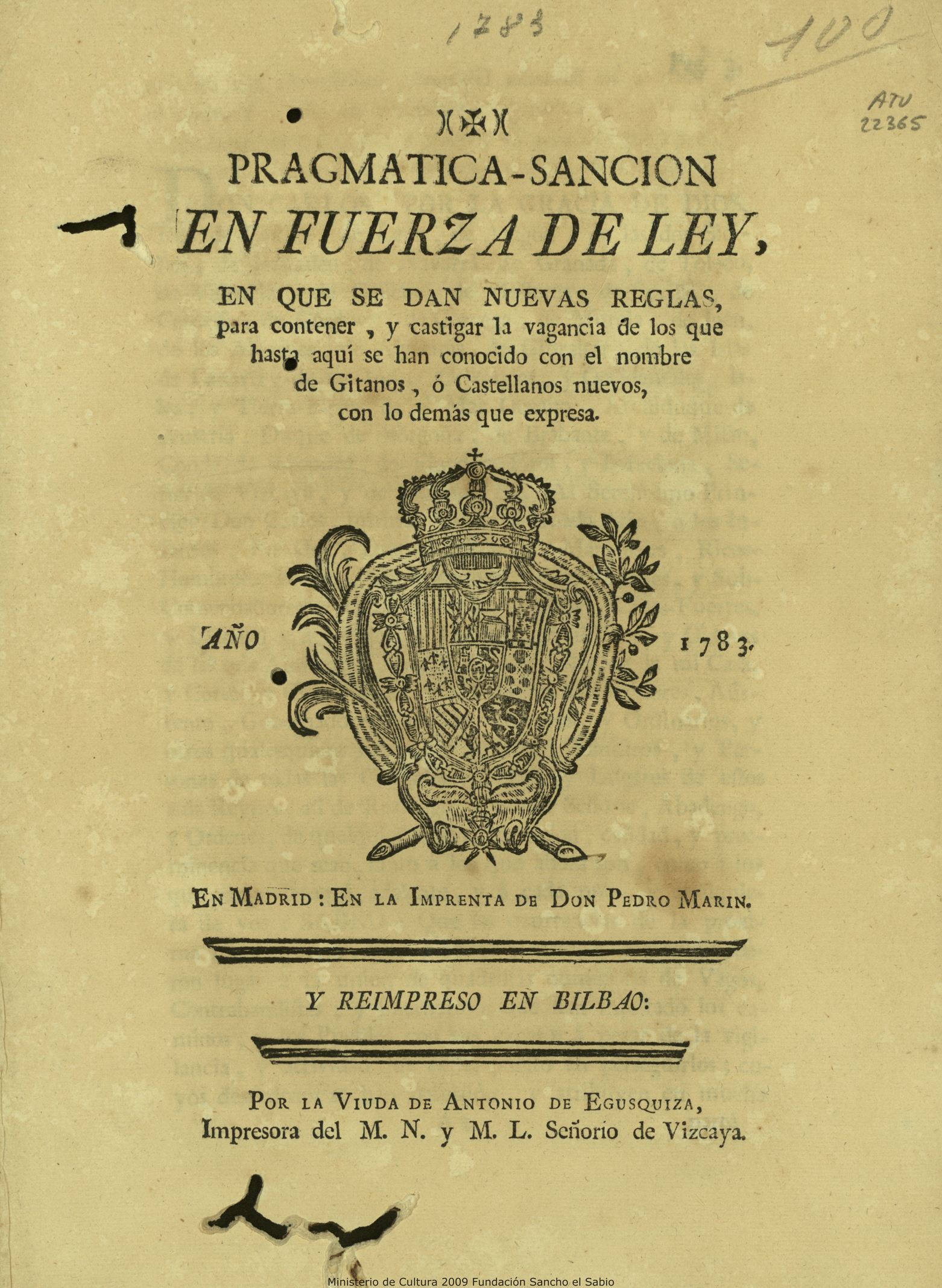 Pragmática-Sanción en fuerza de ley, en que se dan nuevas reglas, para contener, y castigar la vagancia de los que hasta aquí se han conocido con el nombre de Gitanos, o Castellanos nuevos, con lo demás que expresa